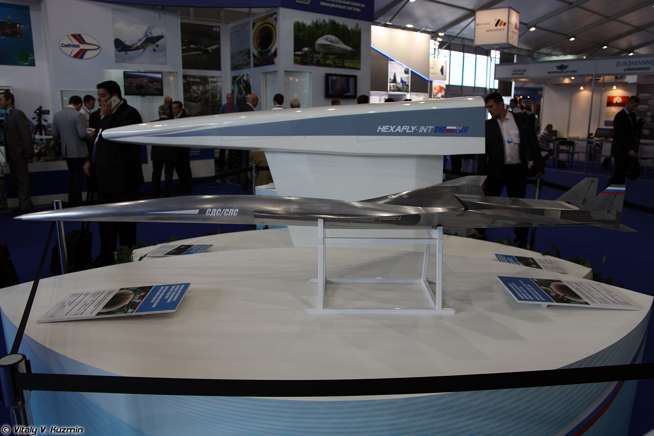 Модель сверхзвукового делового/пассажирского самолета (Model of supersonic airplane)